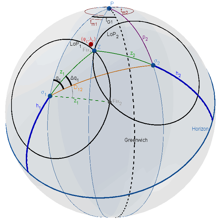 Гауссово решение задачи нахождения координат пересечений изолиний высоты светил.